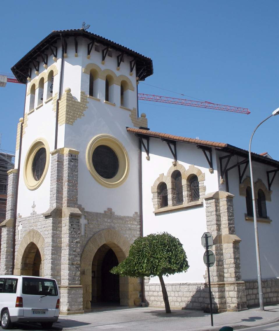 Iglesia de Santa María Magdalena (Fuenterrabía)